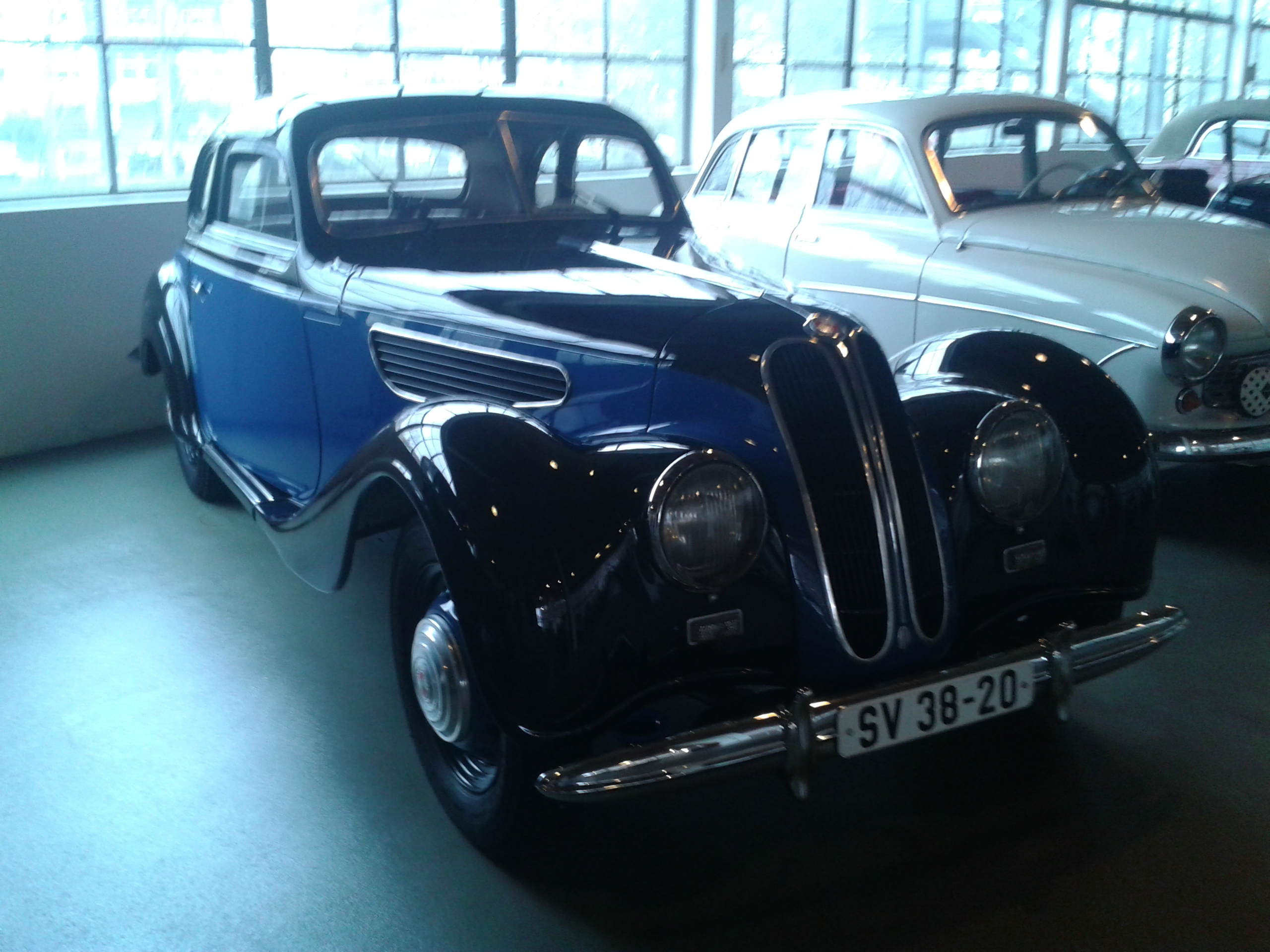 EMW 327/3 Coupe im Museum automobile welt eisenach.